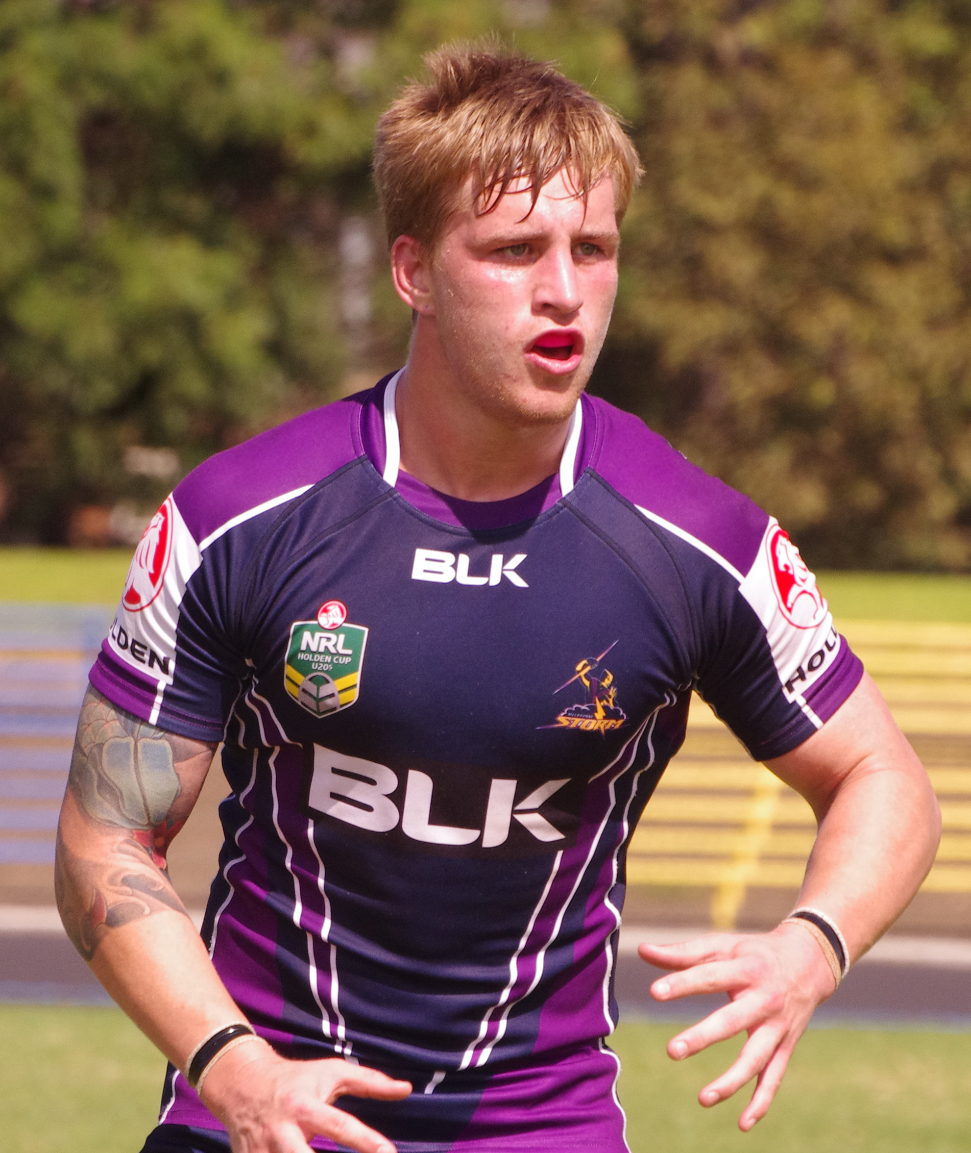 CAMERON MUNSTER